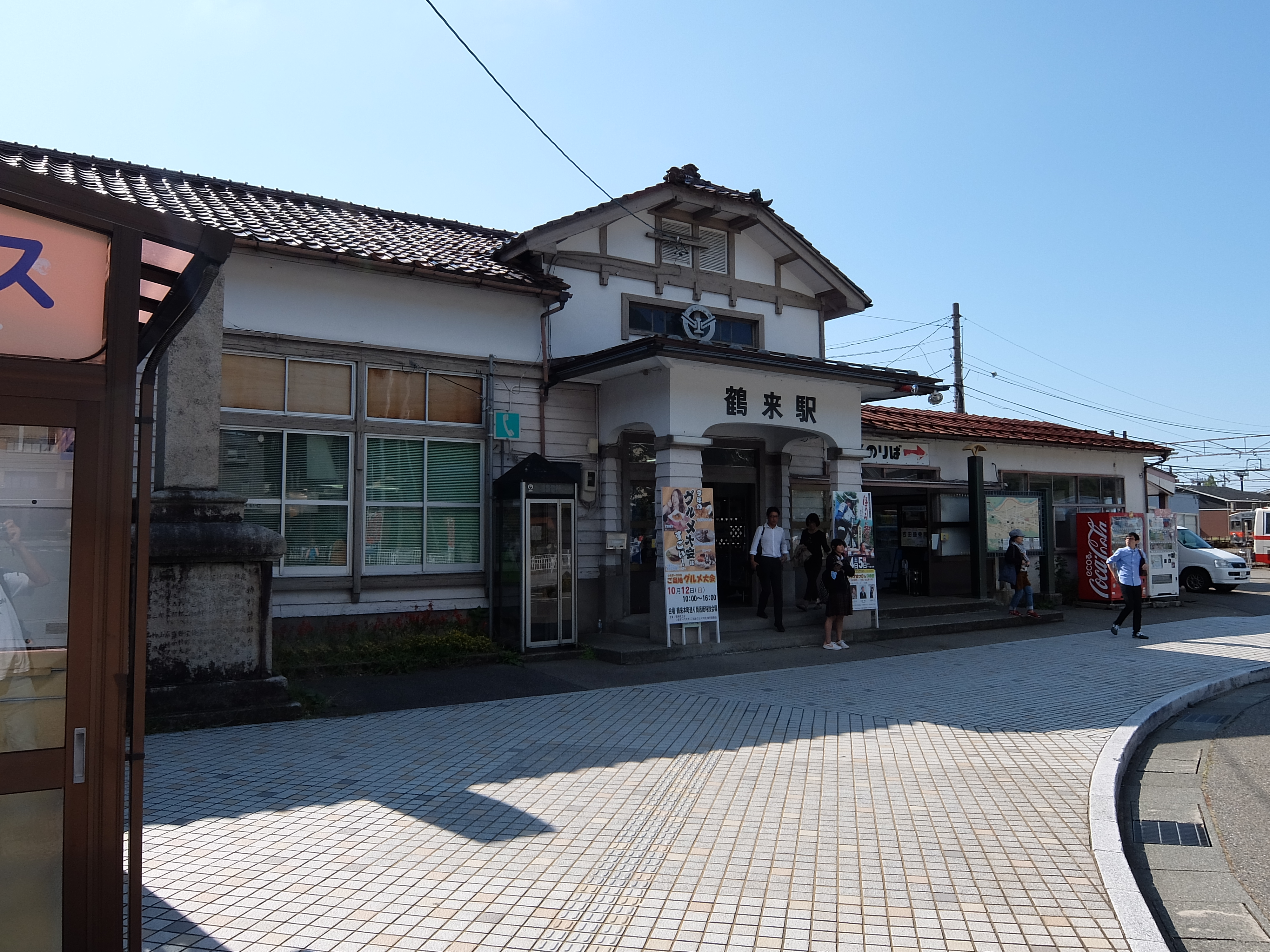 北陸鉄道 鶴来駅 駅舎